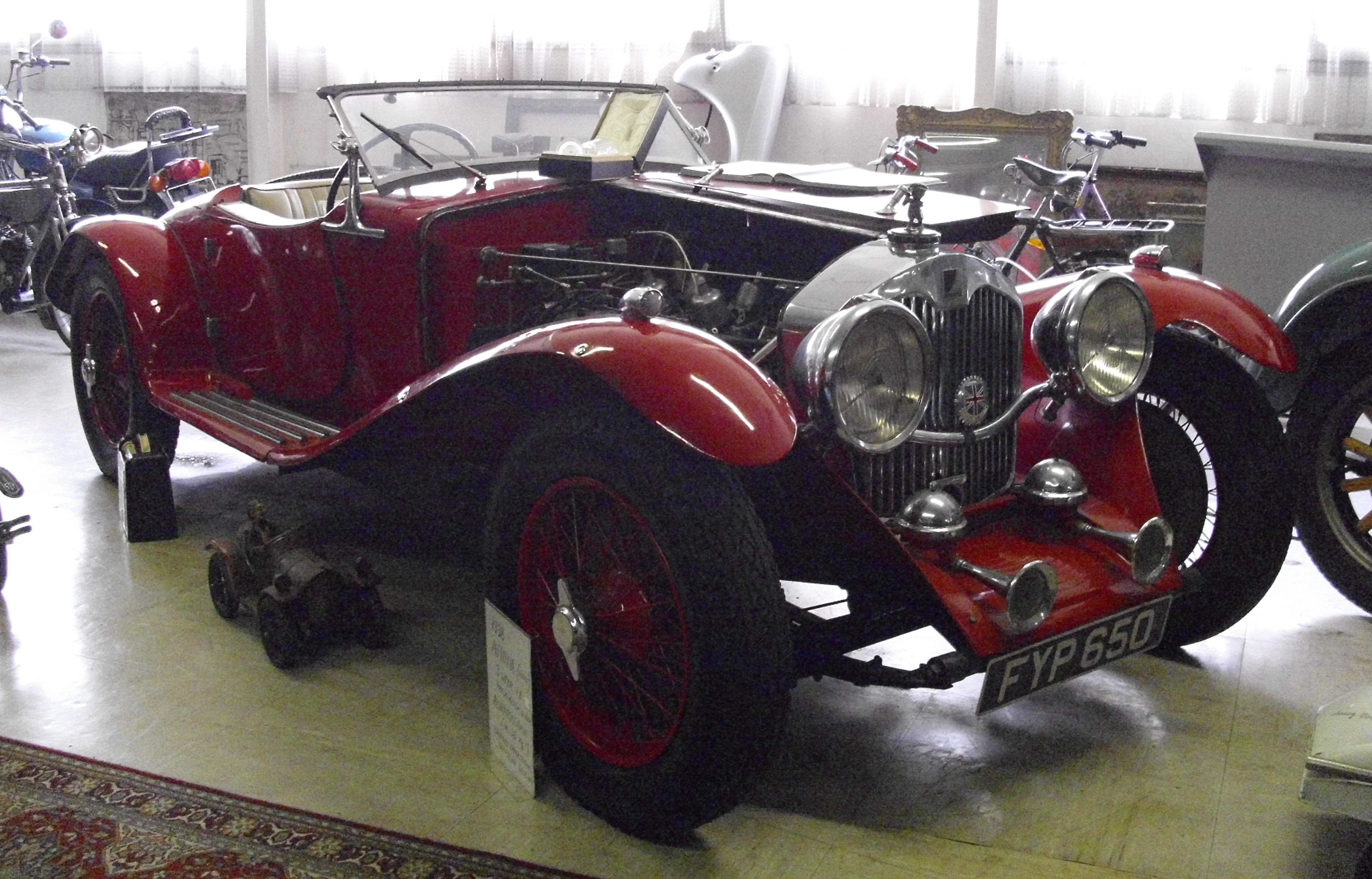 Autovia 1938 im Automobilmuseum Stainz (DVLA) first registered 30 September 1939, 2849cc